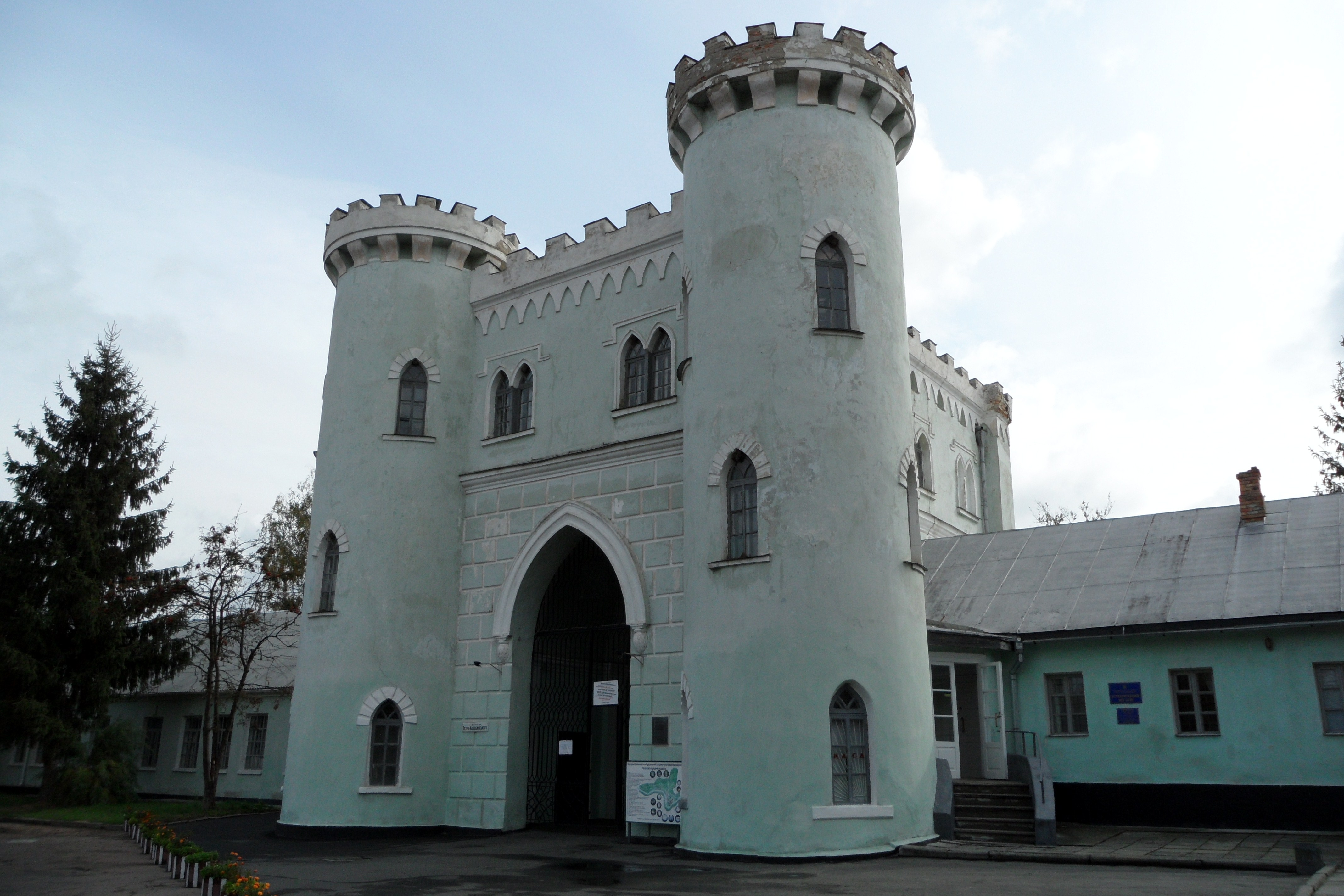 Памятник 2-ой полловины ХІХ в.